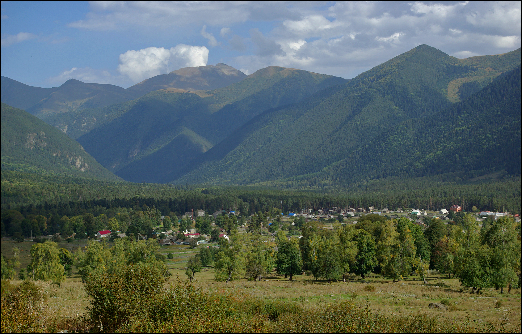 Посёлок Архыз